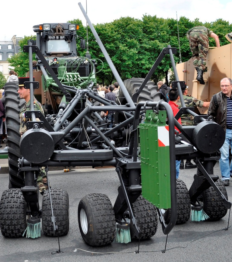 Véhicule détecteur de mines du système d'ouverture d'itinéraire miné du 13e régiment du génie de Valdahon (Doubs) de l'armée de terre française. Exposé à l'esplanade des Invalides à Paris, le 14 juillet 2012.